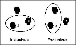 Typologia językowa - inclusivus i exclusivus.